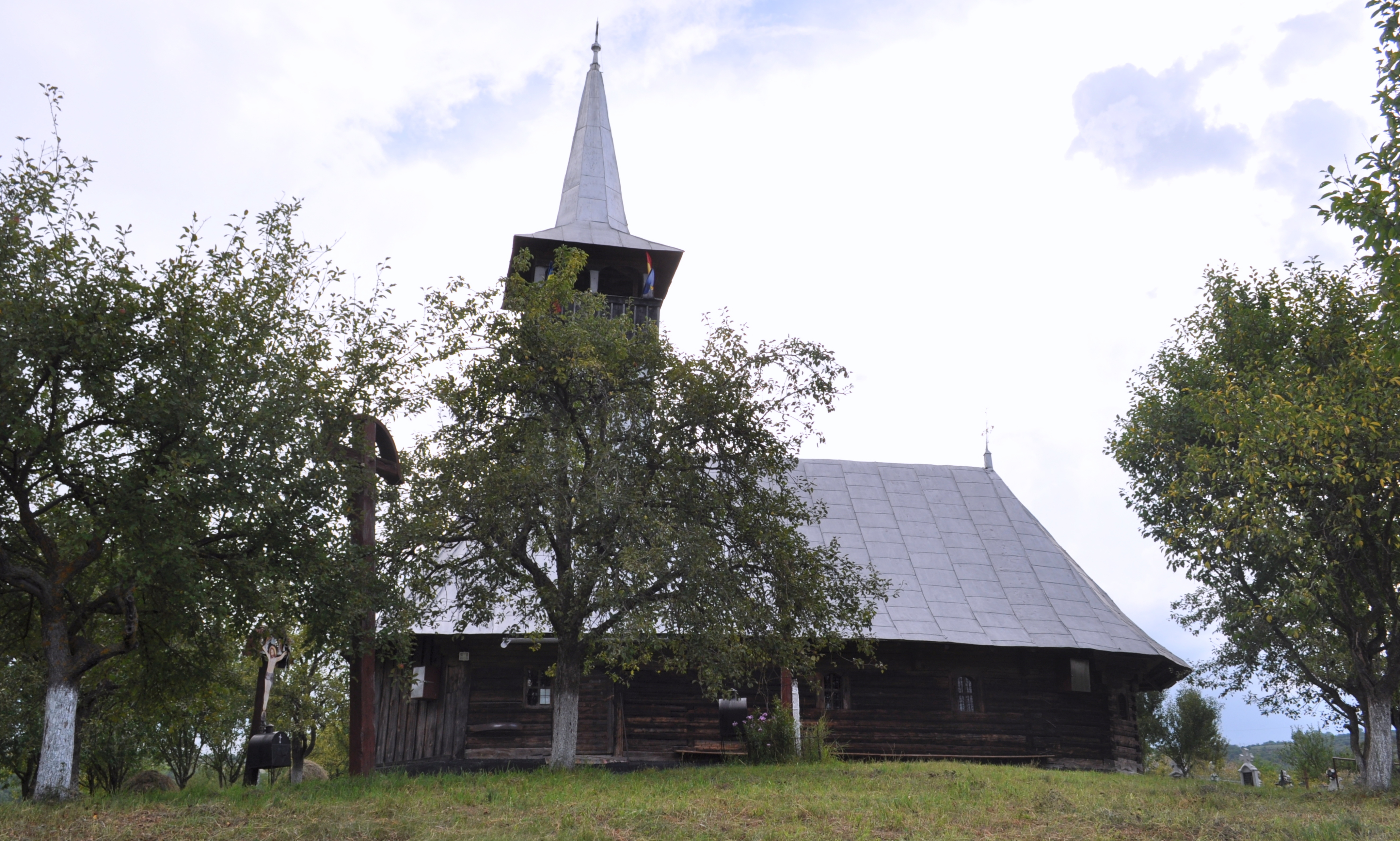 Biserica de lemn "Sf. Arhangheli Mihail şi Gavriil" din Năsal